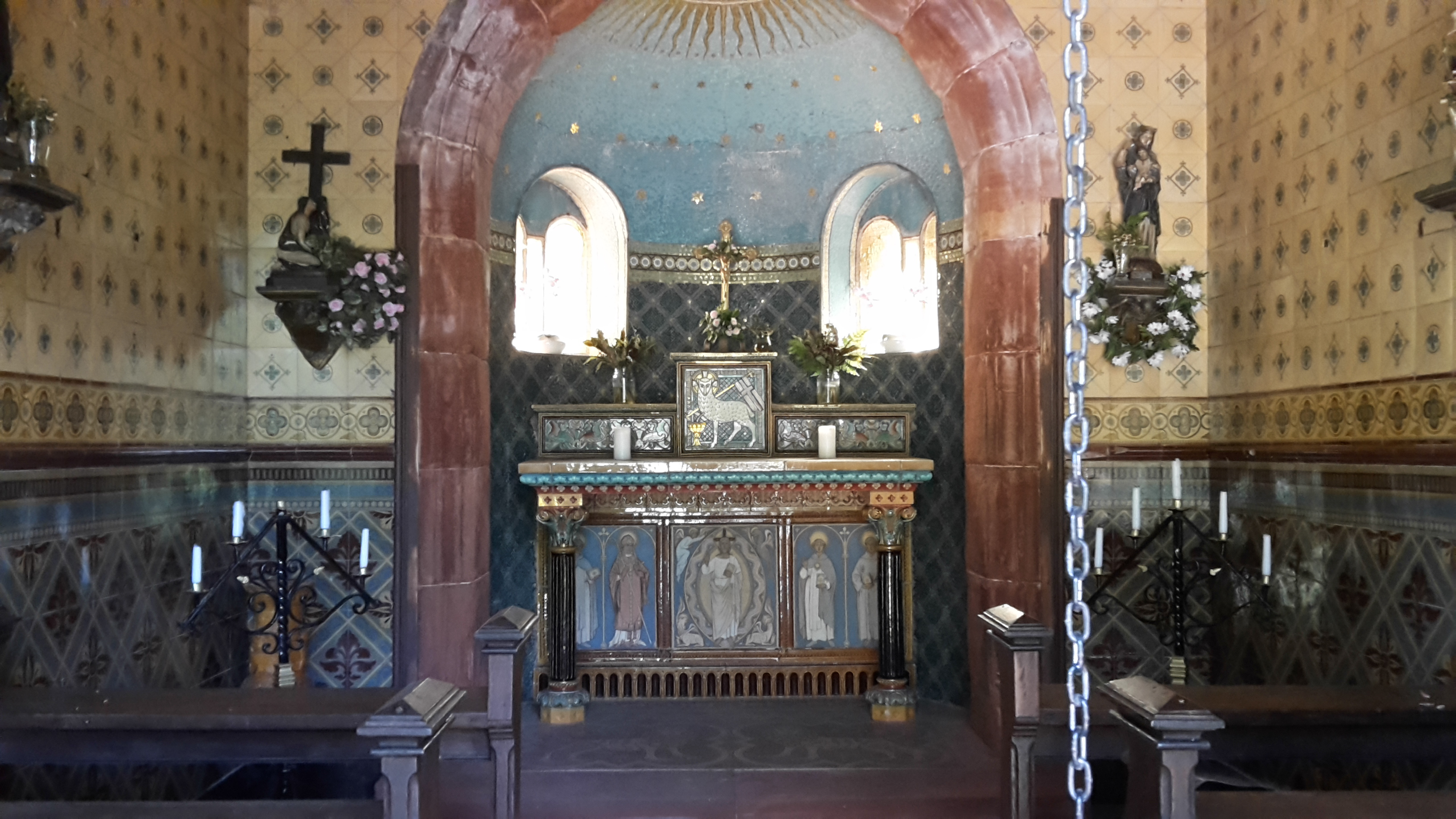 Innenansicht Lutwinuskapelle Weiten (Mettlach)